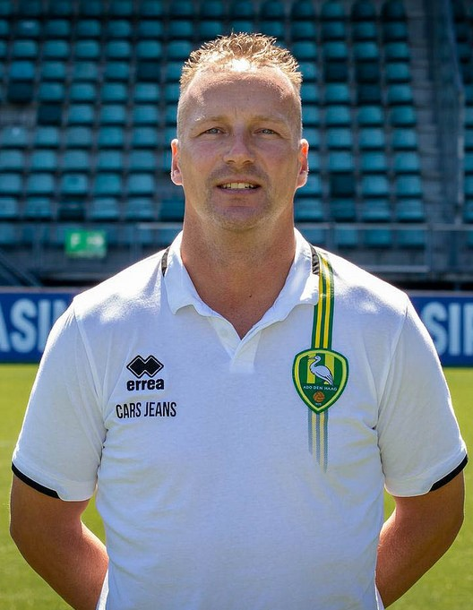 Edwin de Graaf